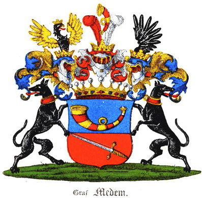 Wappen der Grafen von Medem